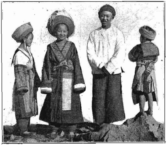 Người H'Mông ở Đồng Văn